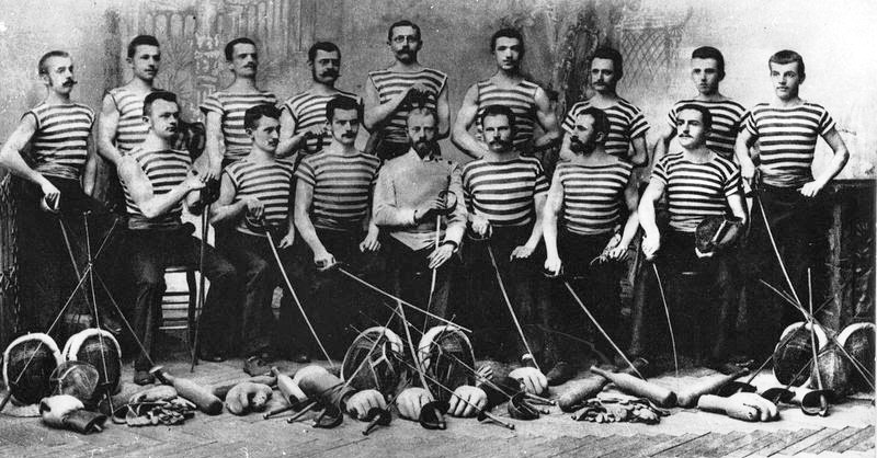 A Budapesti Torna Egylet vívócsapata 1693/94-ben. Középen Bély Mihály vívóedző.